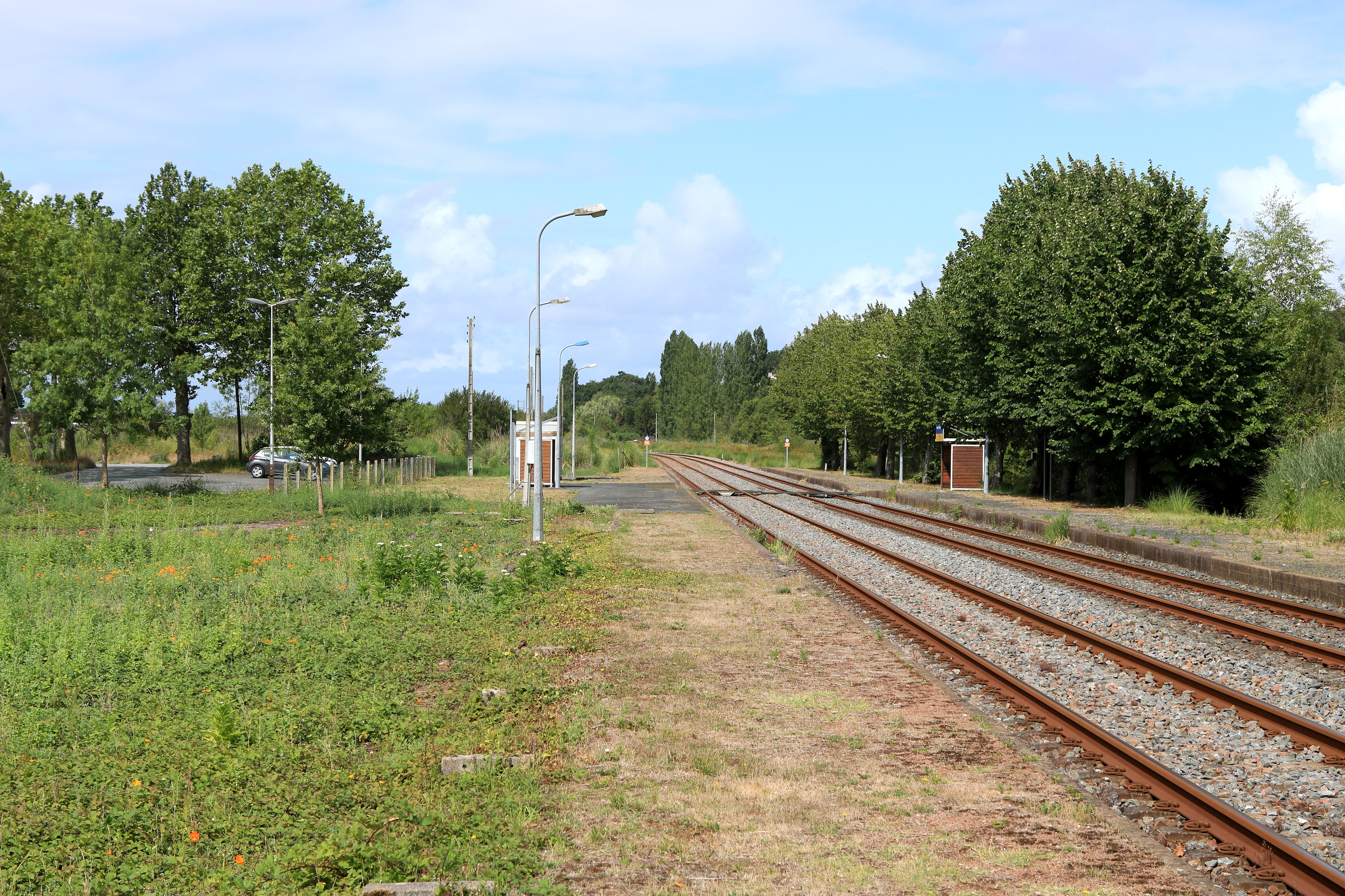 Vue générale de la halte de Tonnay-Charente, en direction de Rochefort.